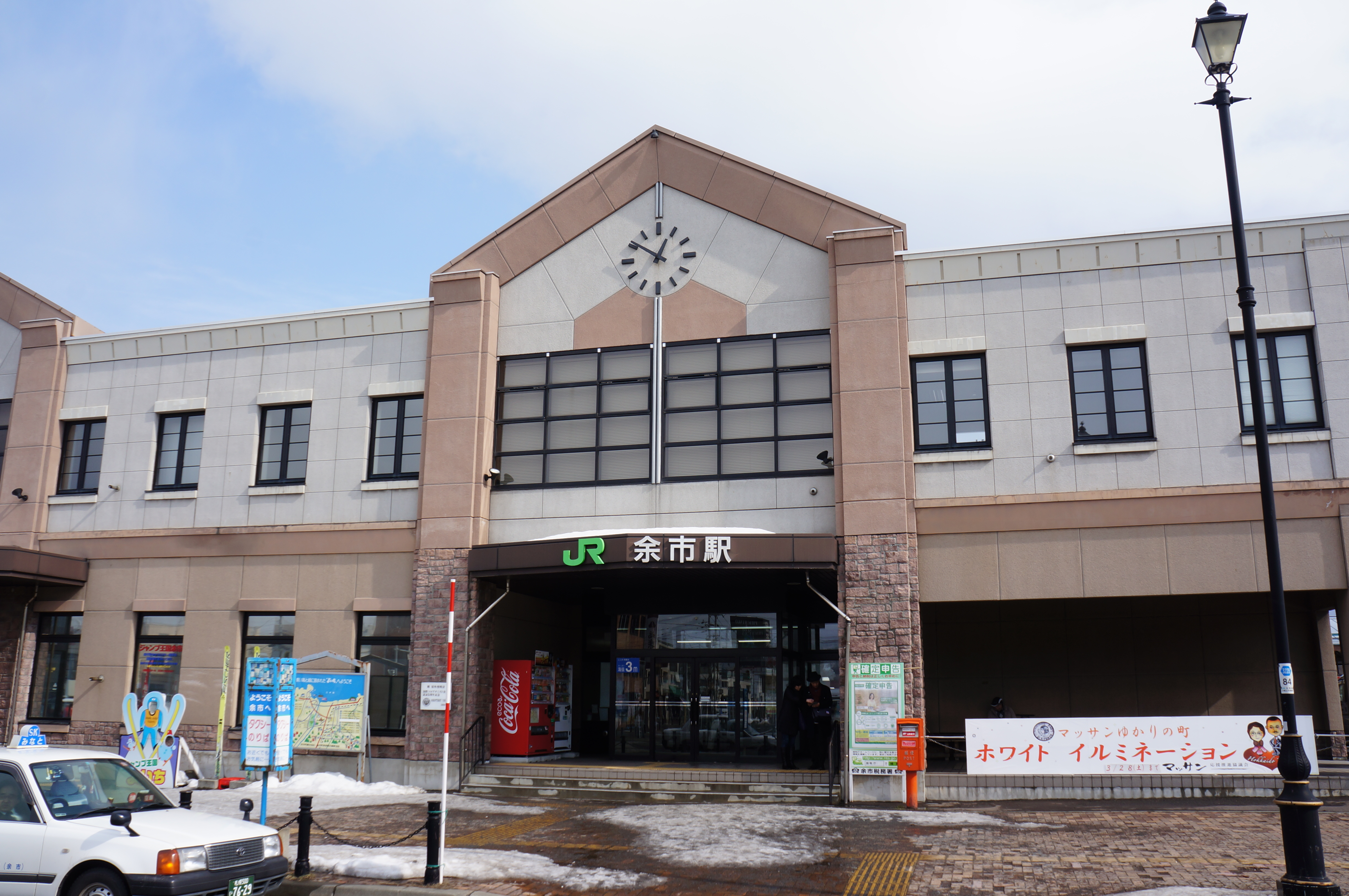 from Eye-Fi